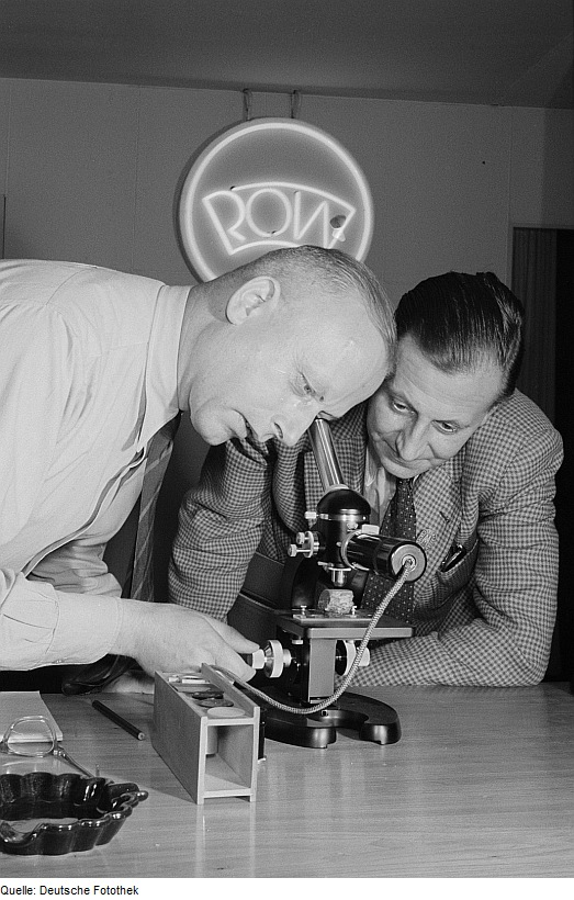 Original image description from the Deutsche Fotothek Zwei Männer an einem Mikroskop des VEB Rathenower Optische Werke auf der Leipziger Herbstmesse 1954